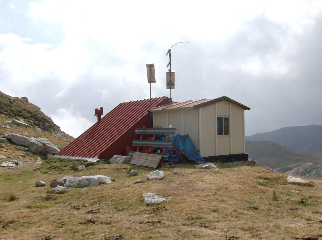 Capanna Scientifica Saracco Volante - Conca di Piaggiabella, Marguareis (Briga Alta, CN). Locale invernale.